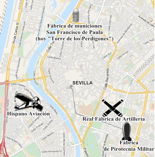 Mapa sacado de Open Street Maps donde han sido situadas las industrias de armamento sevillanas en los años 40 del siglo XX. La producción fabril de estas empresas no ha sobrevivido hasta nuestros días, aunque los edificios siguen en pie total o parcialmente. Los iconos son de Wikimedia Commons. This map may be incomplete, and may contain errors. Don't rely solely on it for navigation.